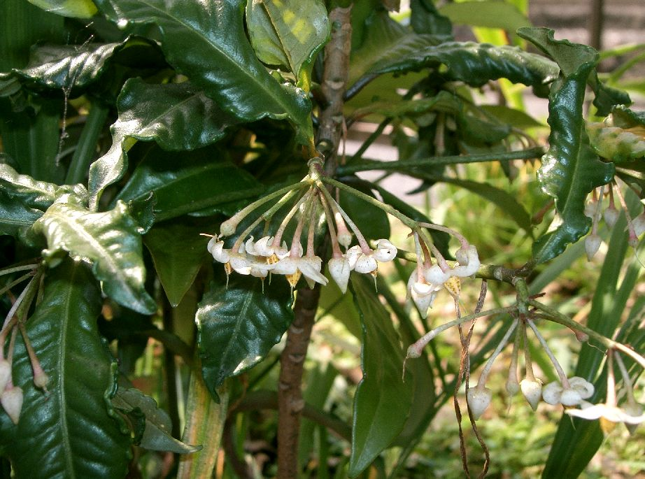 Ardisia crenata